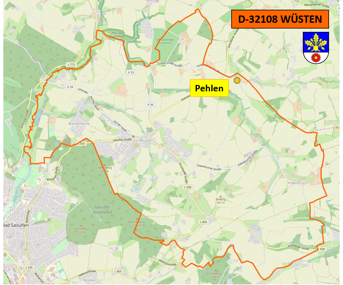 Deutschland (D) - Nordrhein-Westfalen (NW) - Kreis Lippe (LIP) - Bad Salzuflen - Wüsten: Ortsteil 'Pehlen', Lage im Ortsgebiet